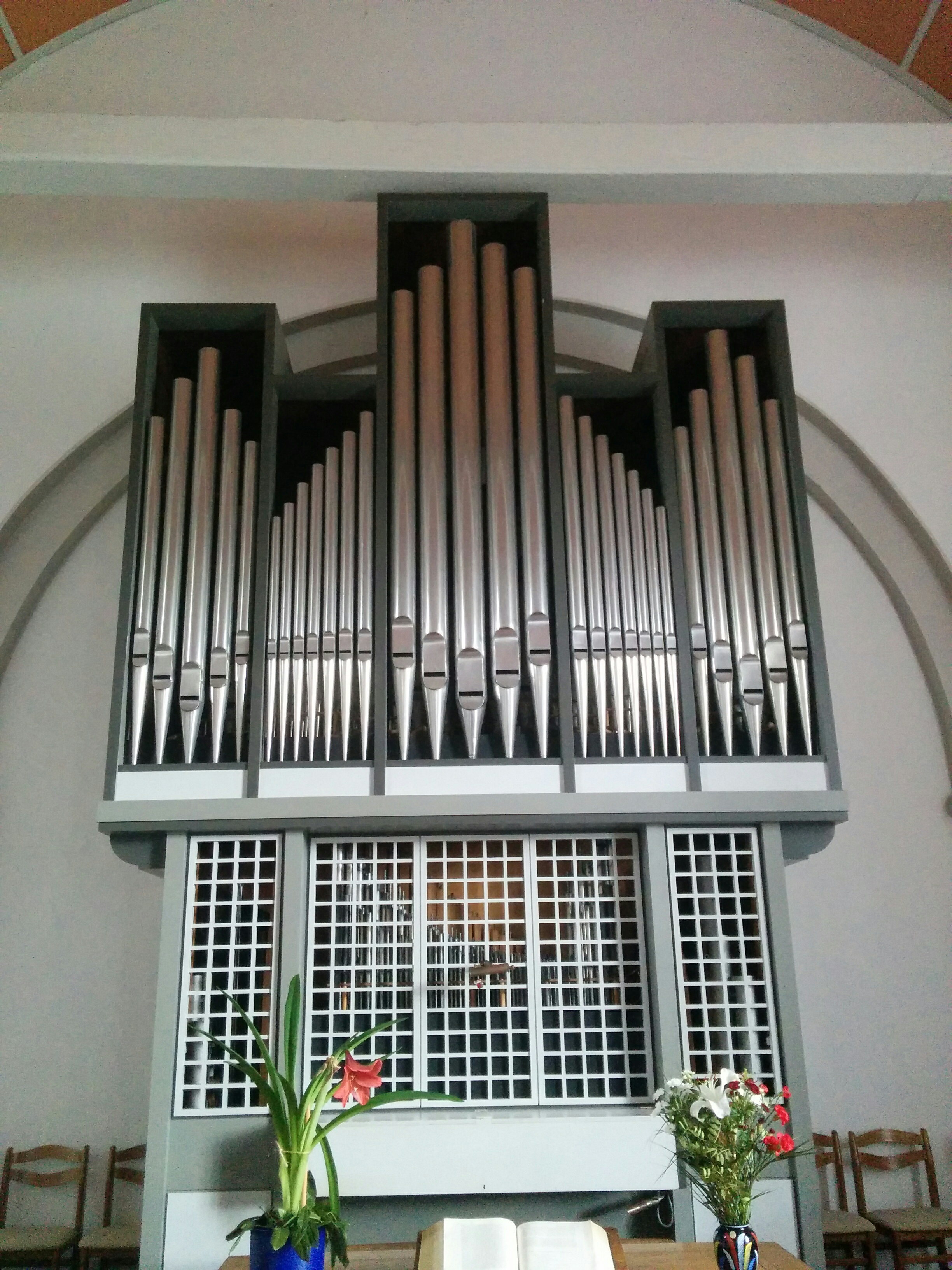 Orgel der Kirche in Ditzum